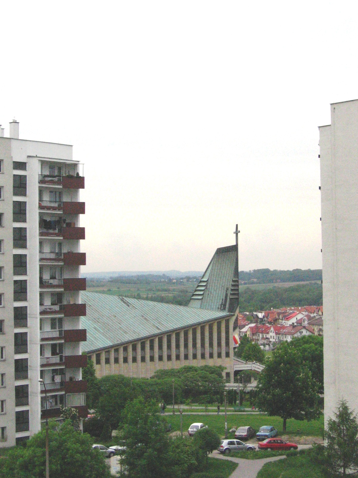 kościół pw św.Maksymilianana osiedlu Tysąclecia w Krakowie(widok z okien budynku)